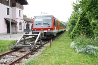 Bahnhof Waging, Nahverkehrszug vor Prellbock